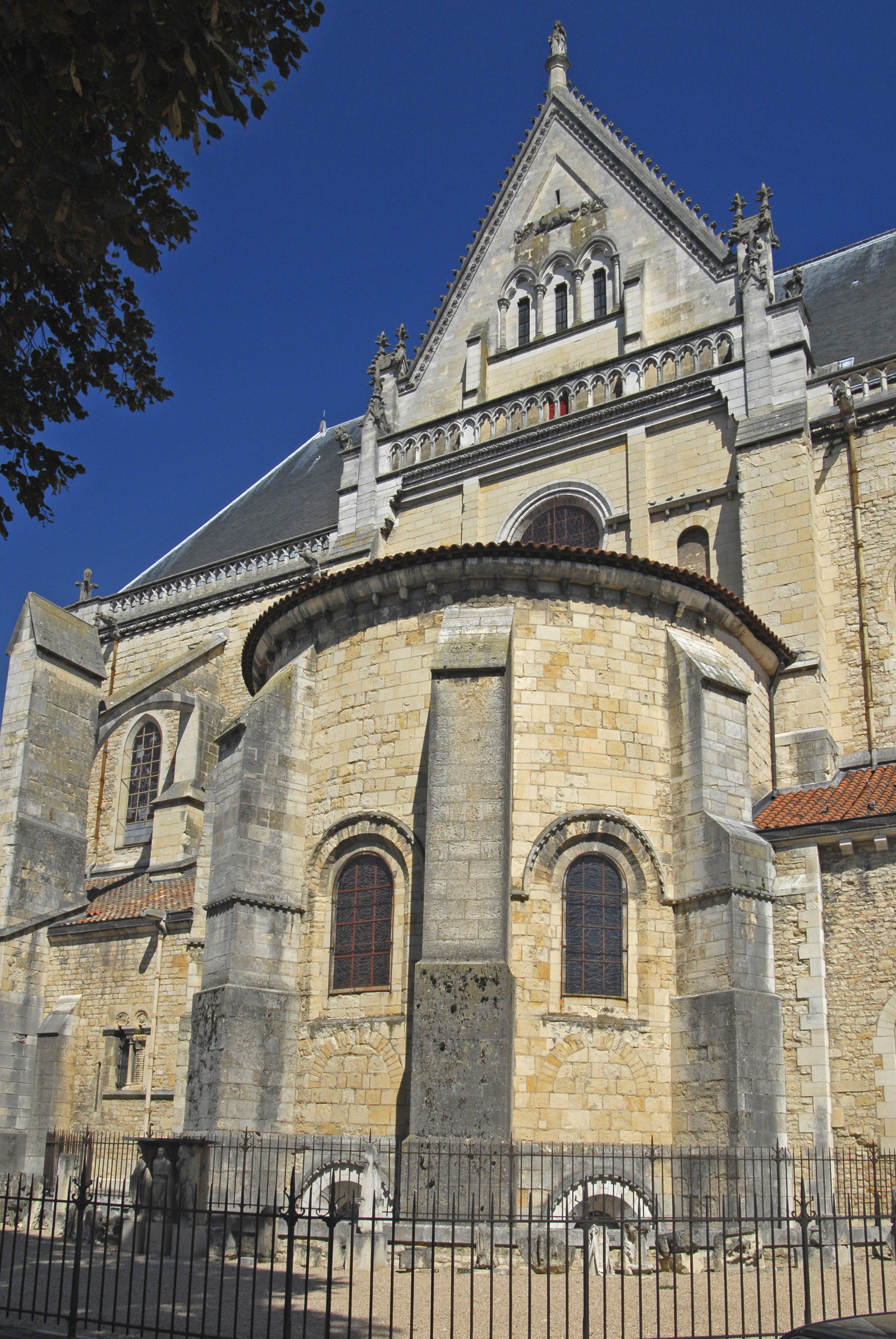 Kathedrale Nevers, Westchor von SW